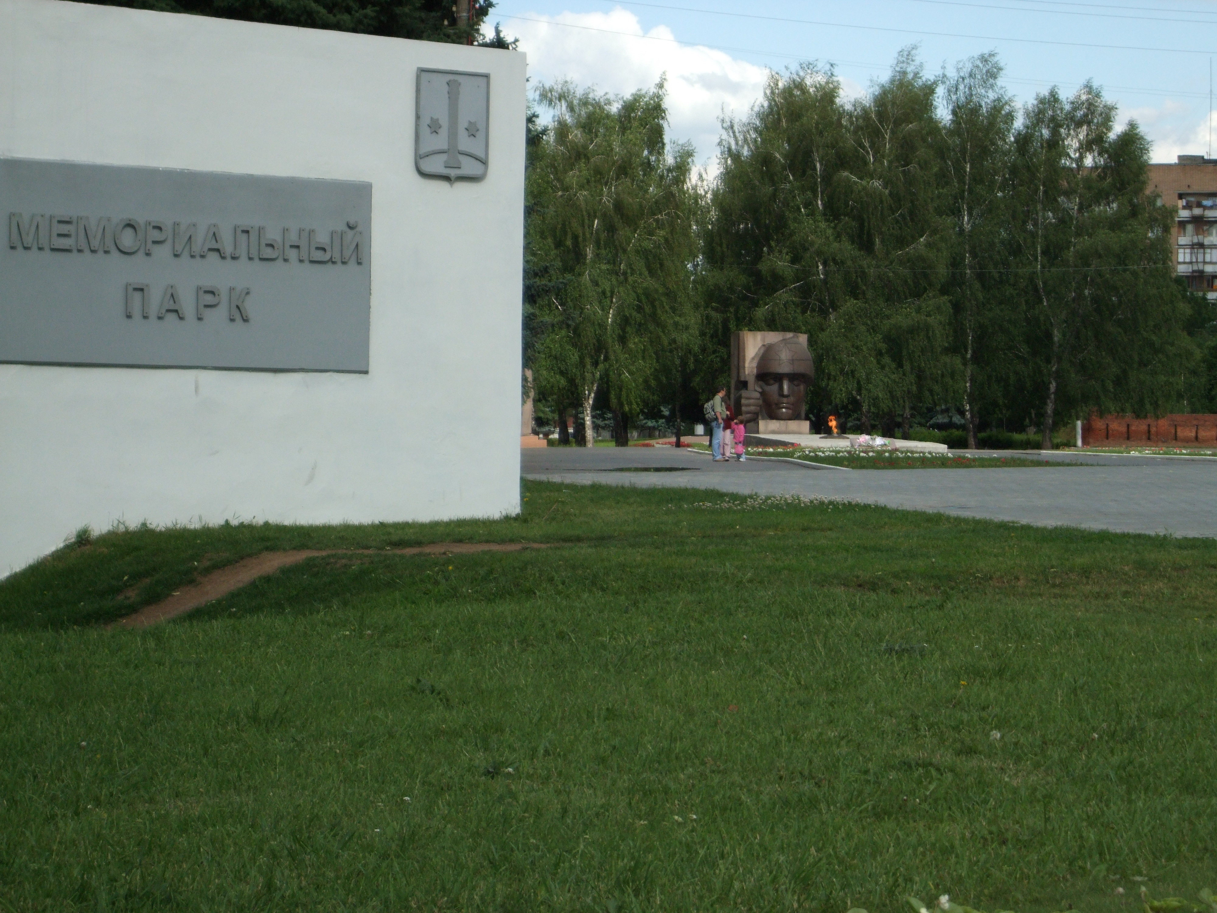 Московская область, город Коломна, вход в Мемориальный парк